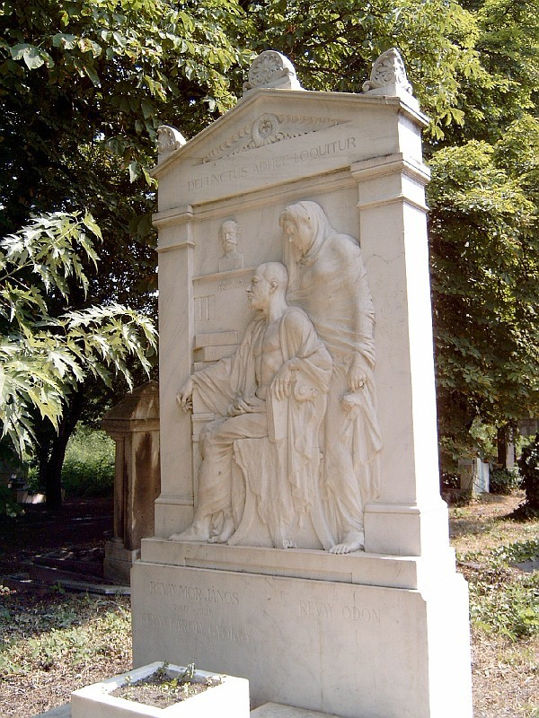 Révay Mór János sírja Budapesten. Kerepesi temető: 26/1-1-26 [szobrász: Róna József].